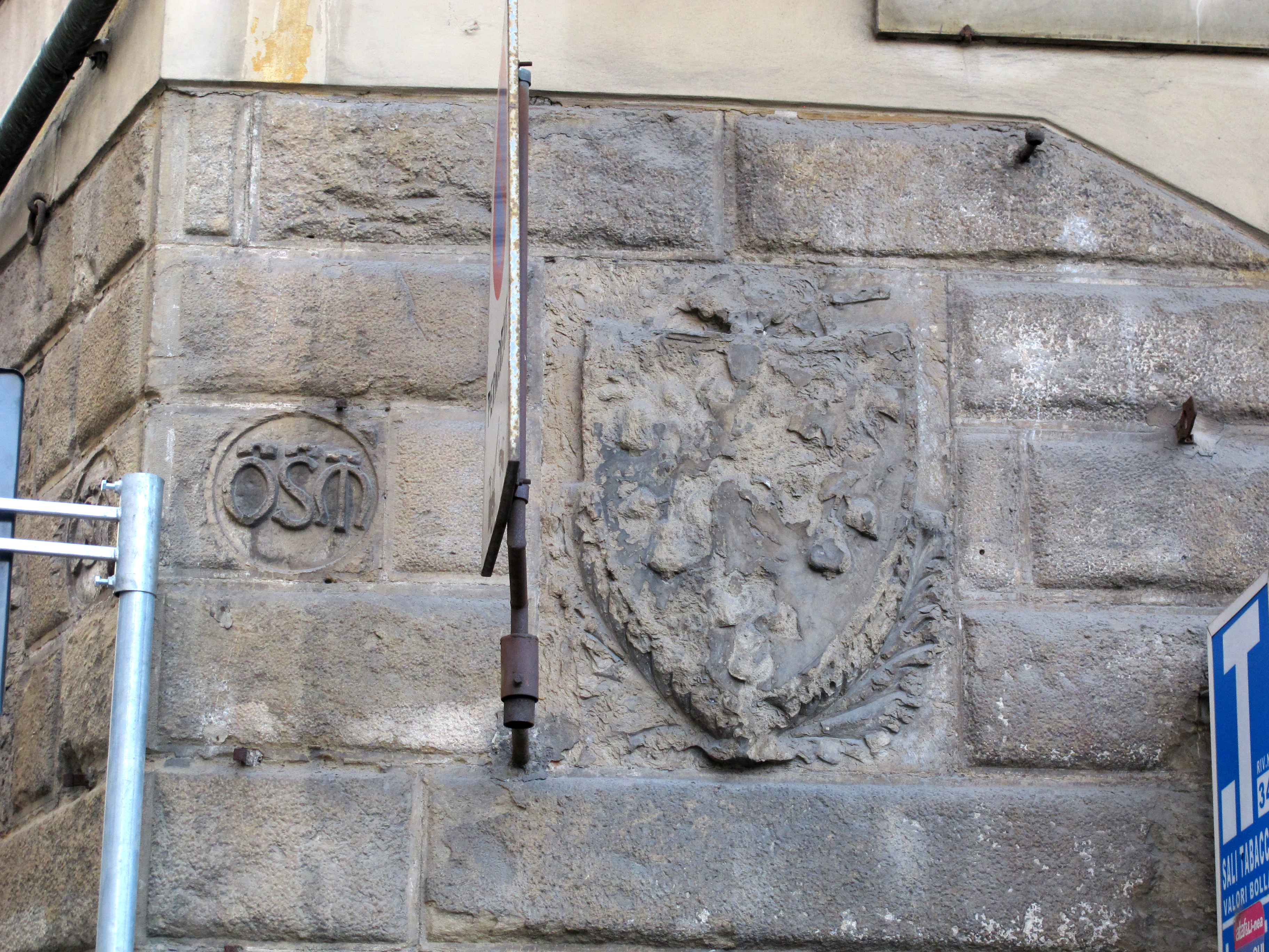 Casa Chiavacci, stemma peruzzi 04 e stemma orsanmichele